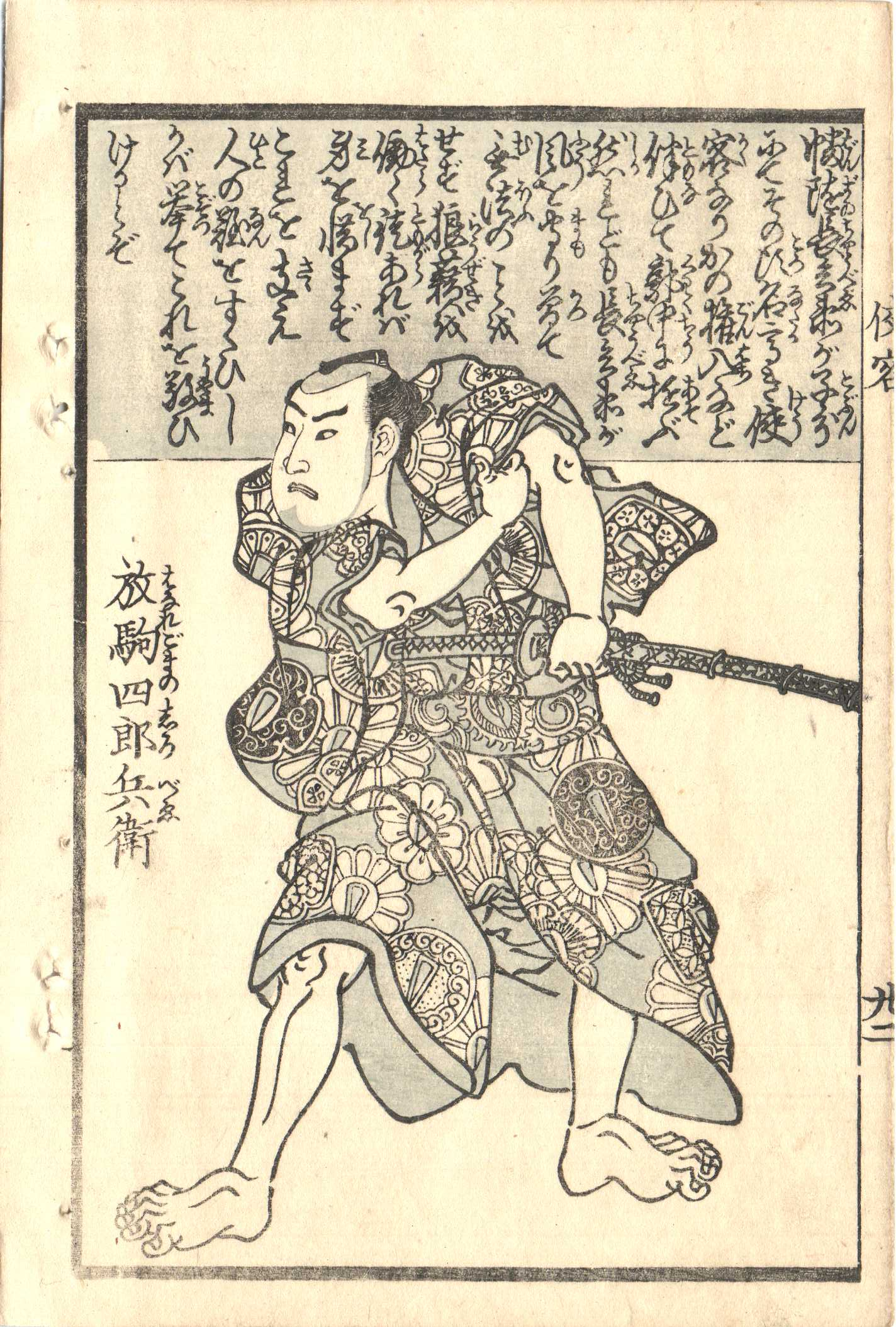 『放駒四郎兵衛』、日吉堂、1913年